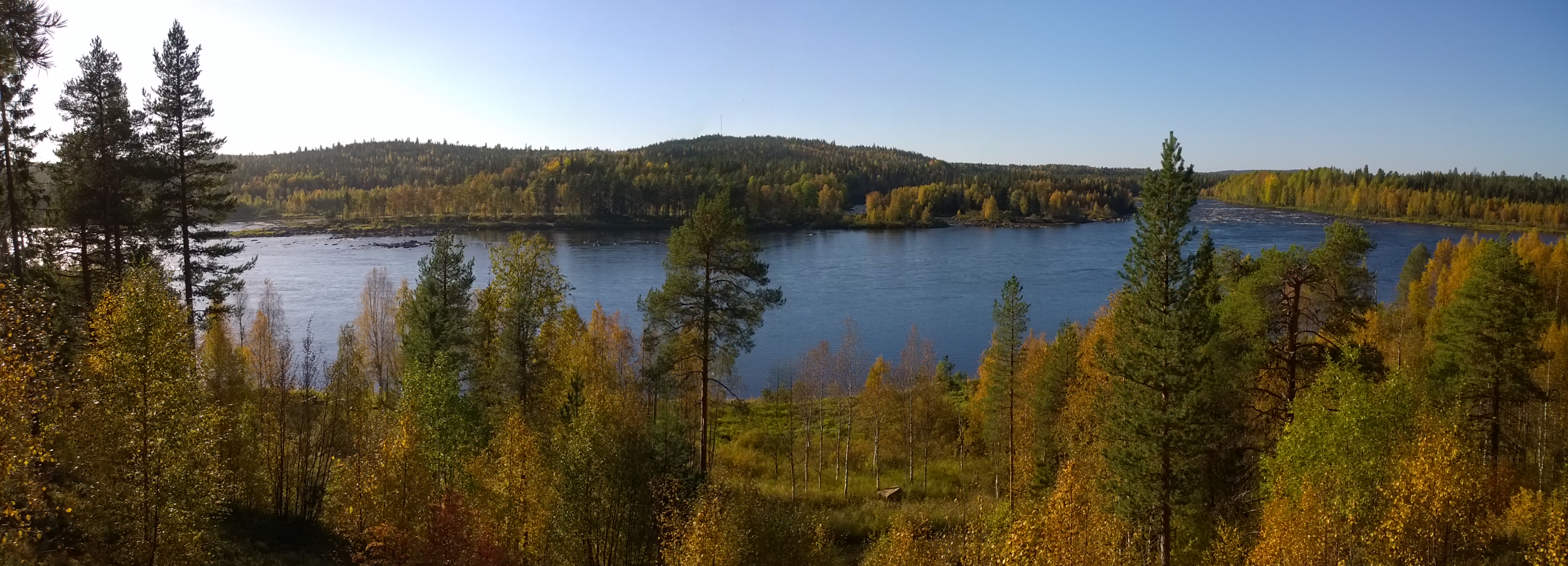 Tornion -Muonionjoen yhtymäkohta